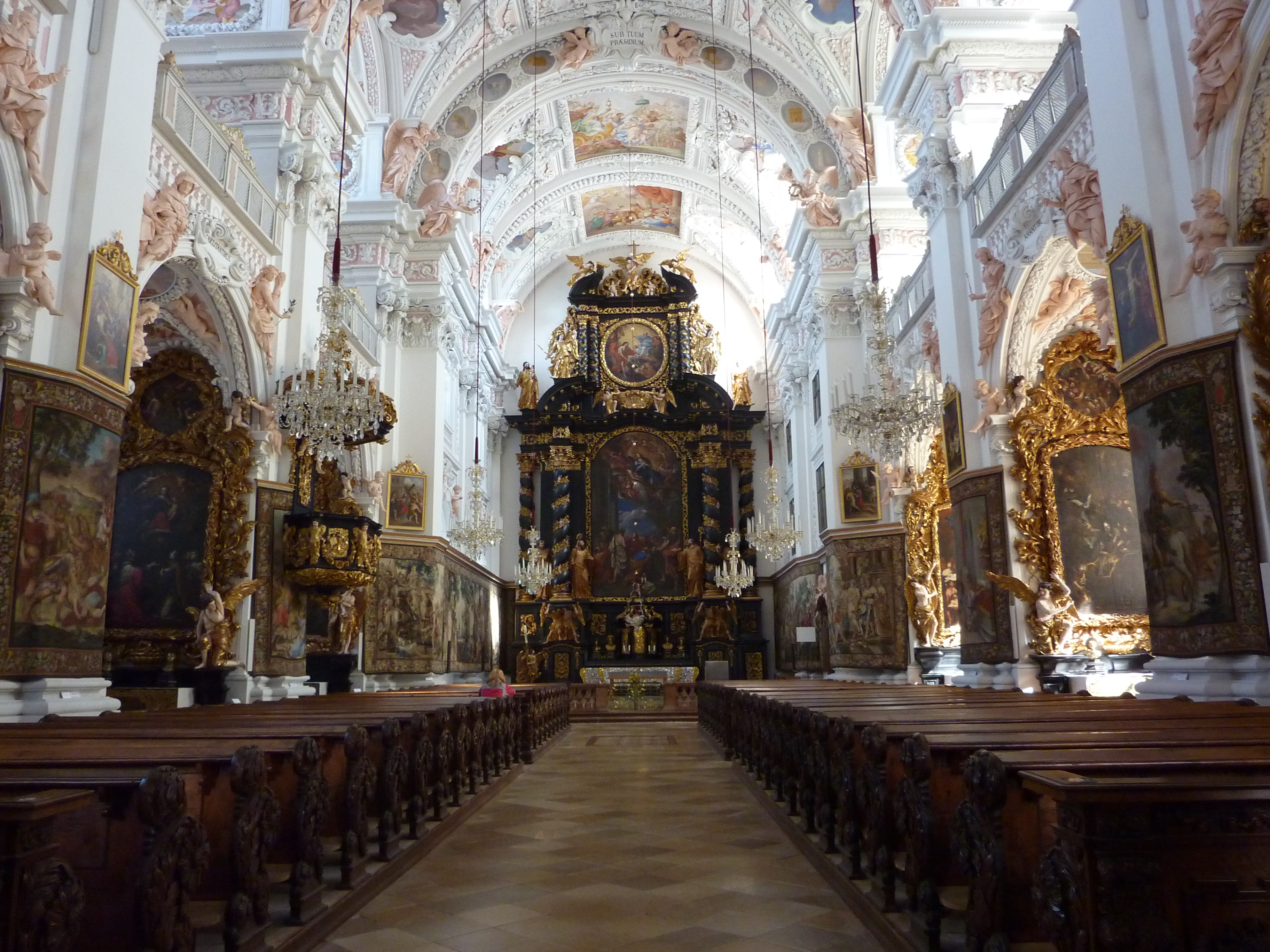 Kath. Pfarrkirche Mariä Himmelfahrt, ehem. Klosterkirche, Am Platzl, Garsten, Oberösterreich